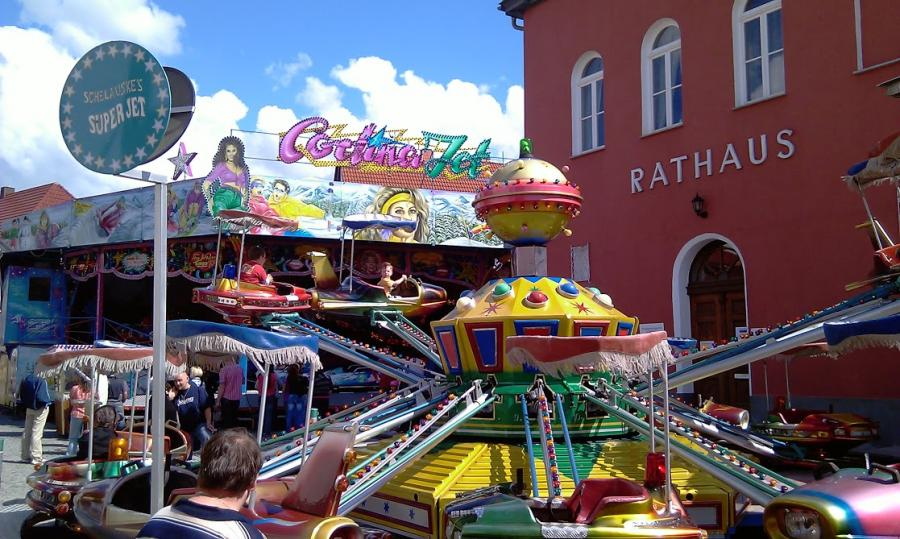 Auf dem Bild sind Karussells vor dem Rathaus auf dem Wilhelm-Külz-Platz in Kaltennorheim zu sehen.